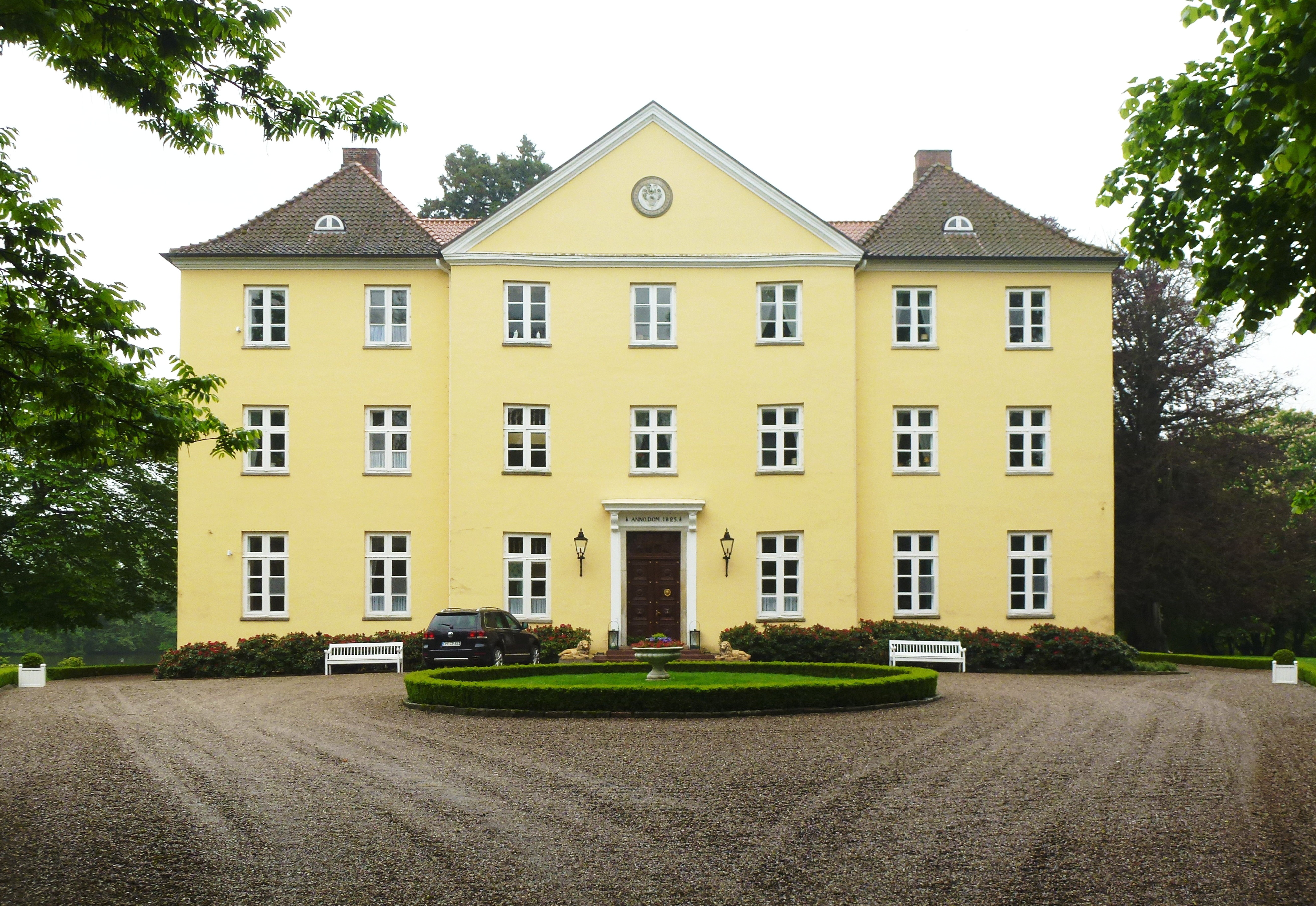 Gut Sierhagen - Haupthaus; Architekt Alexis de Chateauneuf (* 18. Februar 1799 in Hamburg; † 31. Dezember 1853 ebenda).